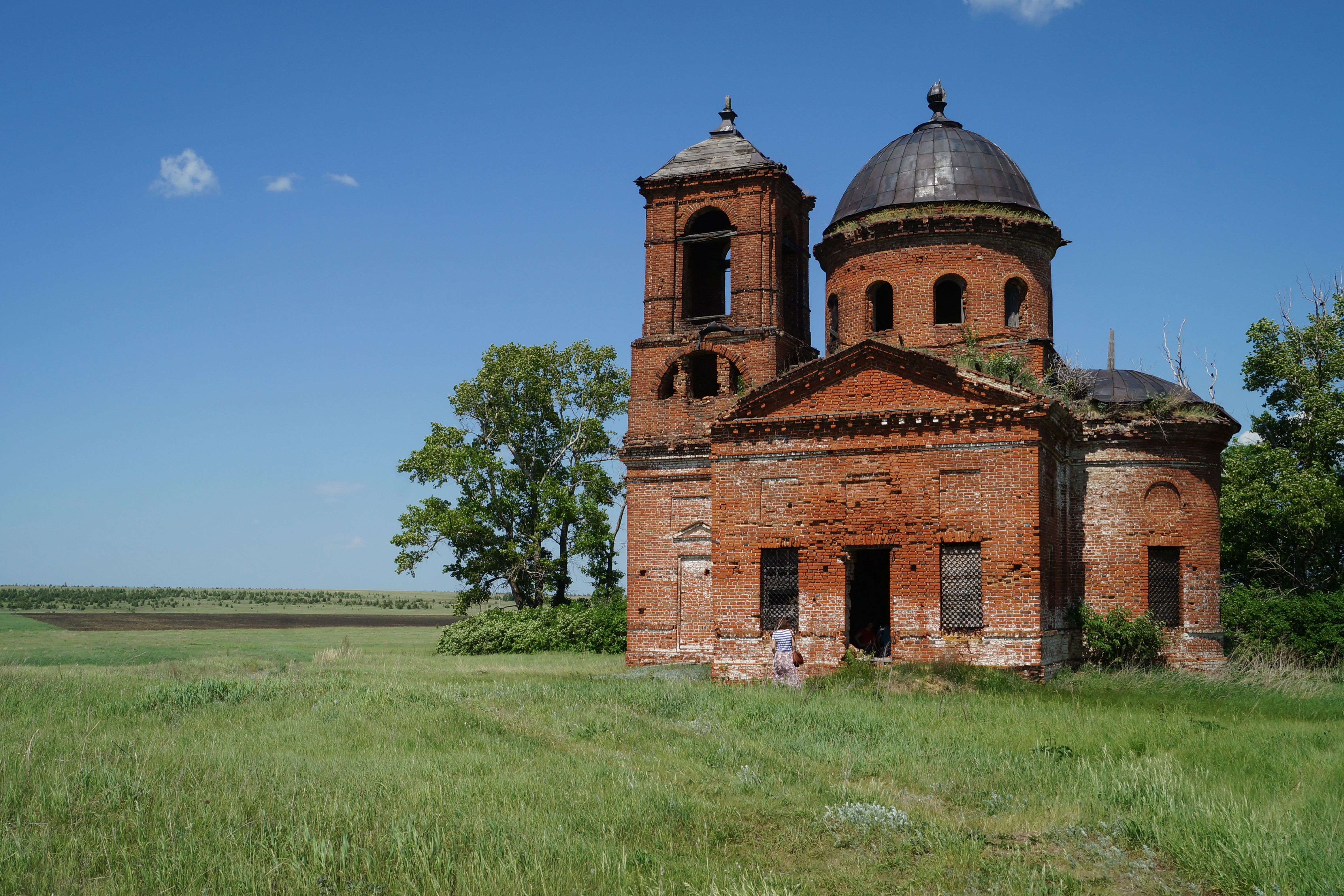 Успенская церковь: Камышлейка, Неверкинский район, Пензенская область